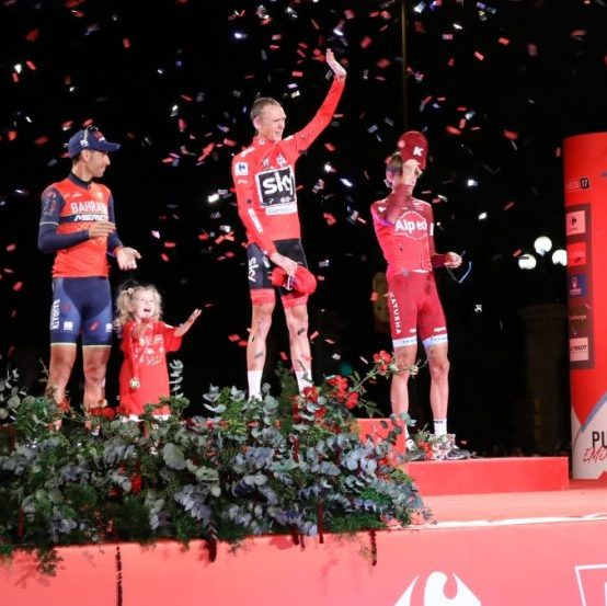 Pasadas las 21 horas del domingo 10 de septiembre, ha finalizado la 72 edición de la Vuelta Ciclista a España 2017 con la entrega de premios. La alcaldesa de Madrid, Manuela Carmena ha hecho entrega al ciclista italiano Matteo Trentin del trofeo al vencedor de la etapa final de la Vuelta (Arroyomolinos-Madrid). Durante el acto, la alcaldesa ha estado acompañada por el tercer teniente de alcalde, Mauricio Valiente, y el director general de Deportes del Ayuntamiento de Madrid, Javier Odriozola.